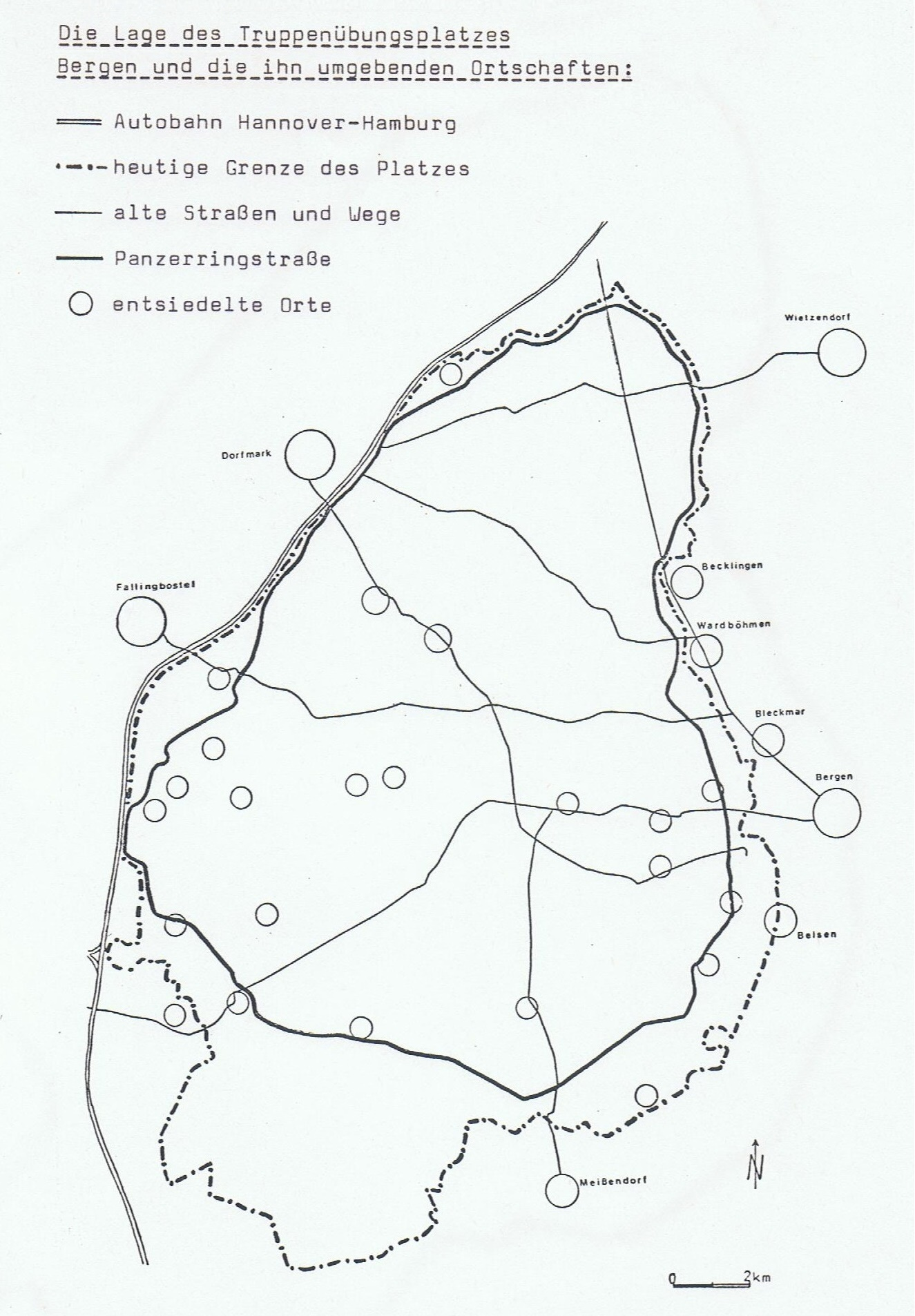 Bei der Einrichtung des Truppenübungsplatzes Bergen entsiedelte Ortschaften